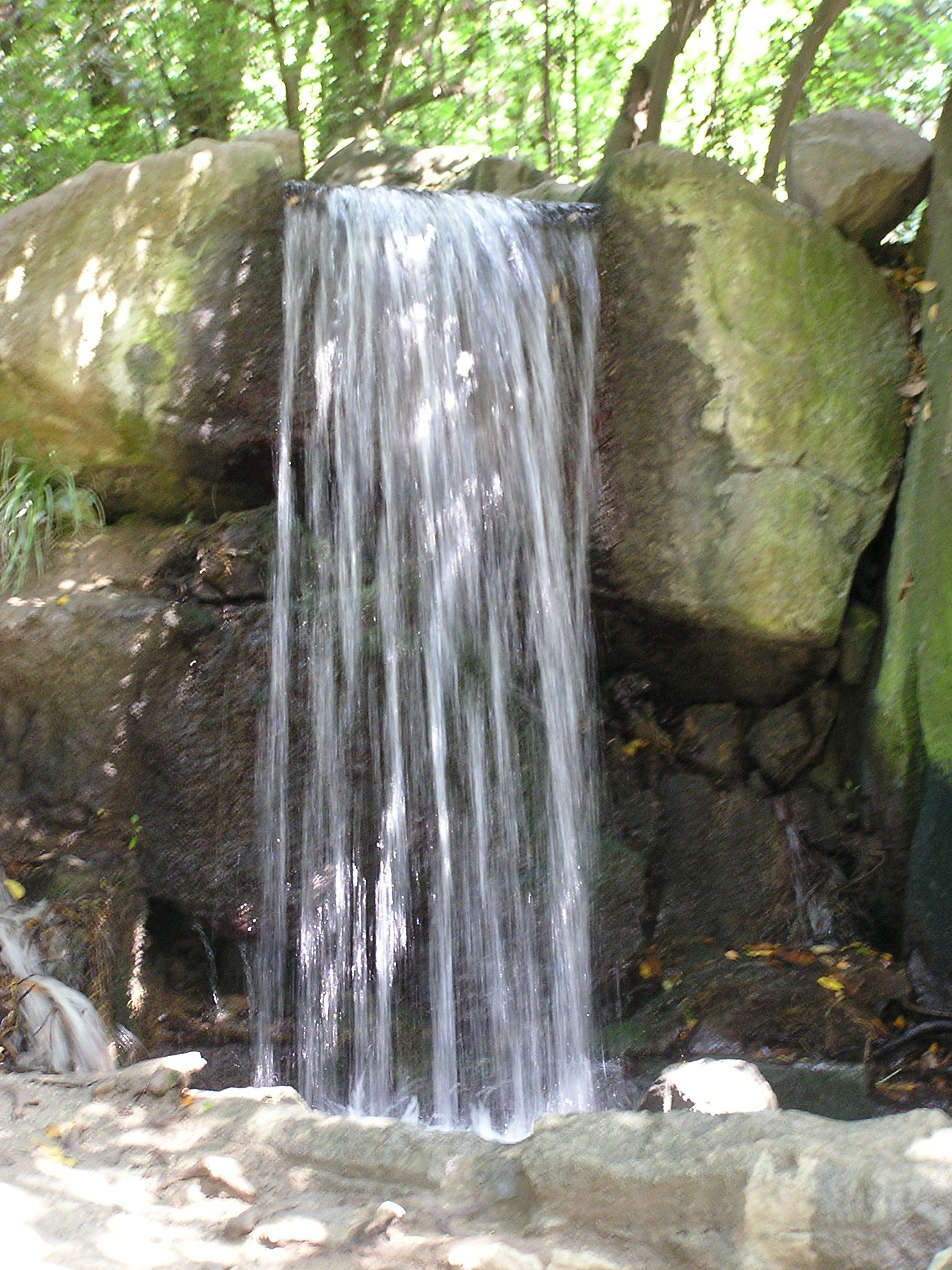 Алупка. Ворнцовский парк